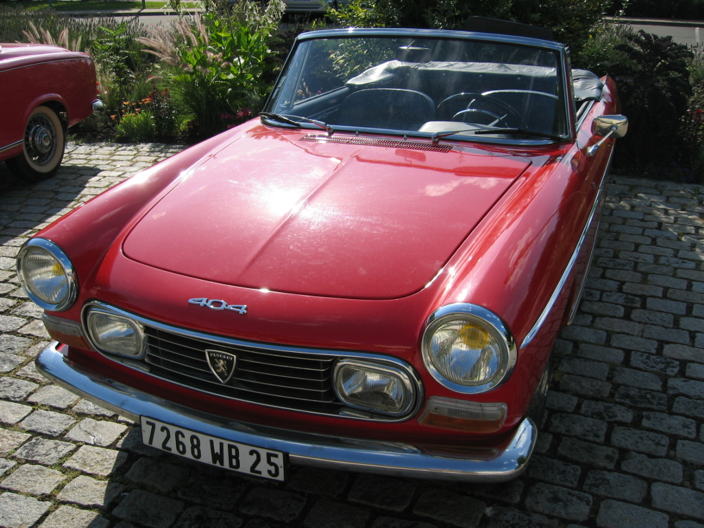 Peugeot 404 Cabriolet